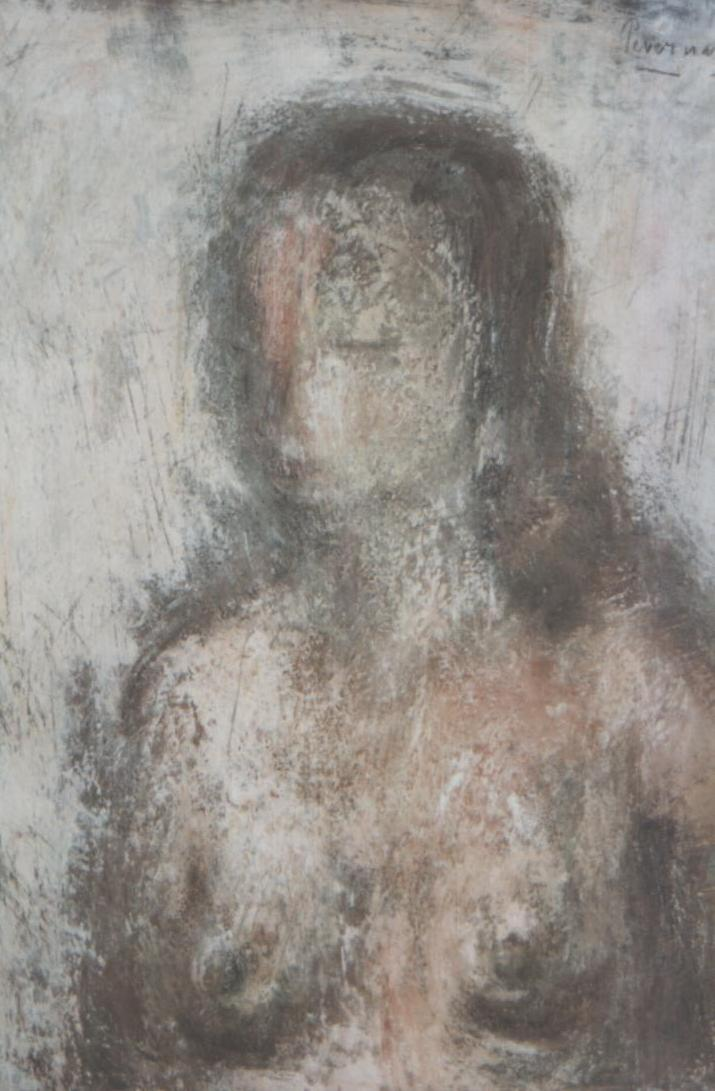 Fille par Louis Pevernagie